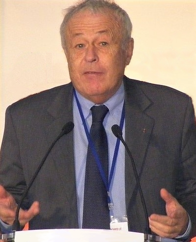 Alain Mérieux en 2010.